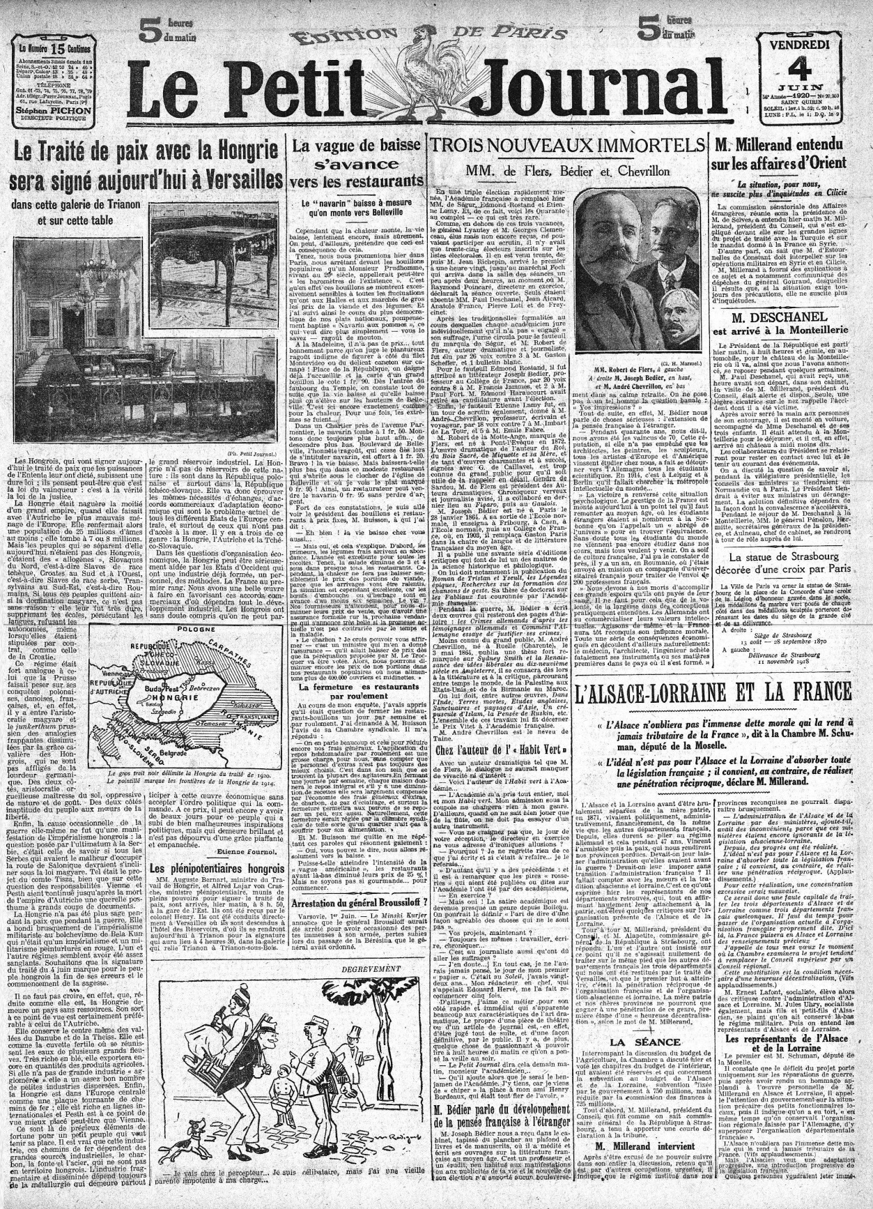 Le Petit journal Auteur : Parti social français. Auteur du texte Éditeur : [s.n.] (Paris) Éditeur : [s.n.] (Clermont-Ferrand) Éditeur : [s.n.] (Pau) Date d'édition : 1920-06-04